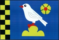 Břežany (ZN), vlajka. Modrý list s černo-žlutě šachovaným (8x2) žerďovým pruhem širokým šestinu délky listu. V modrém poli na volném žlutém trojvrší bílý pták s červenou zbrojí, provázený v horním cípu žlutou růží s červeným semeníkem a zelenými kališními lístky. Poměr šířky k délce listu je 2 : 3.